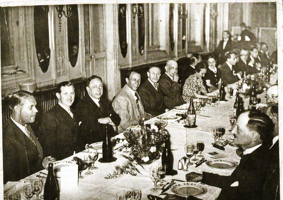 Henri Manuel Syndicat des Éditeurs d’Art et Négociants en Tableaux Modernes 1938von links: Gaston (?) Bernheim-Jeune; Paul Pétrides; Justin Thannhauser; Pierre Loeb; Léonce Rosenberg; André Schoeller; Madame Pierre Loeb; Josse Bernheim; Madame Guillaume-Leray; Paul Rosenberg (Kunsthändler); et alii